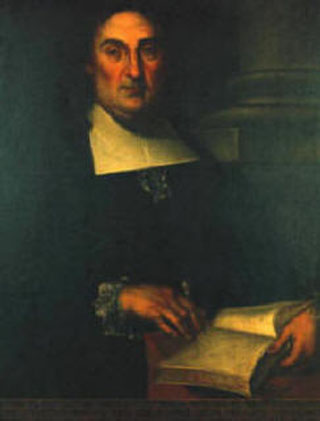 Lorenzo Bolano (1540-1613), illustre medico catanese